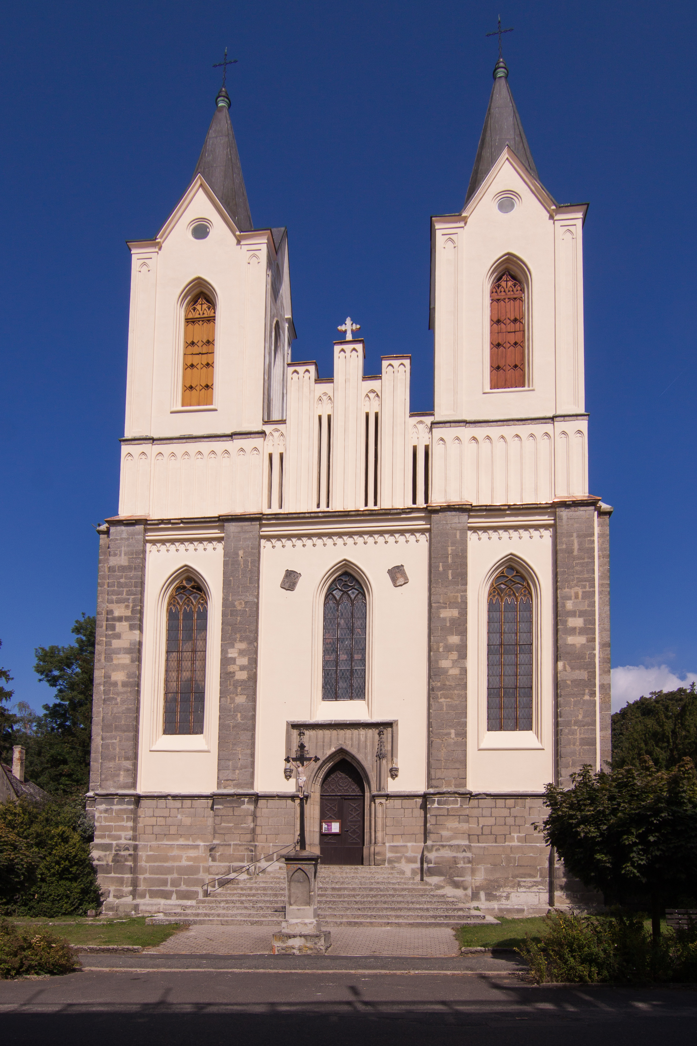 Kostel P. Marie Vítězné, Řepín